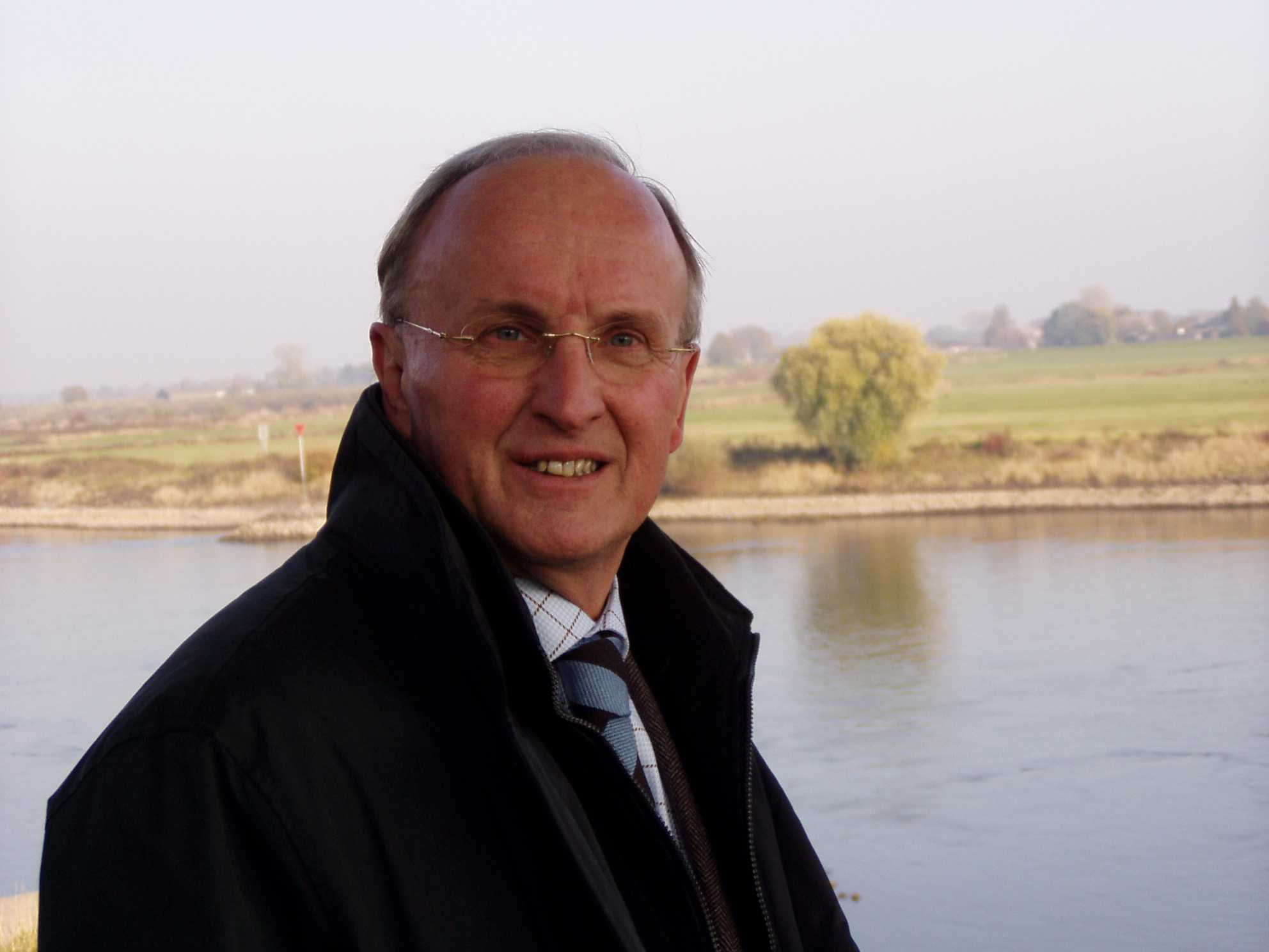 Harry (H.G.J.) van Roekel